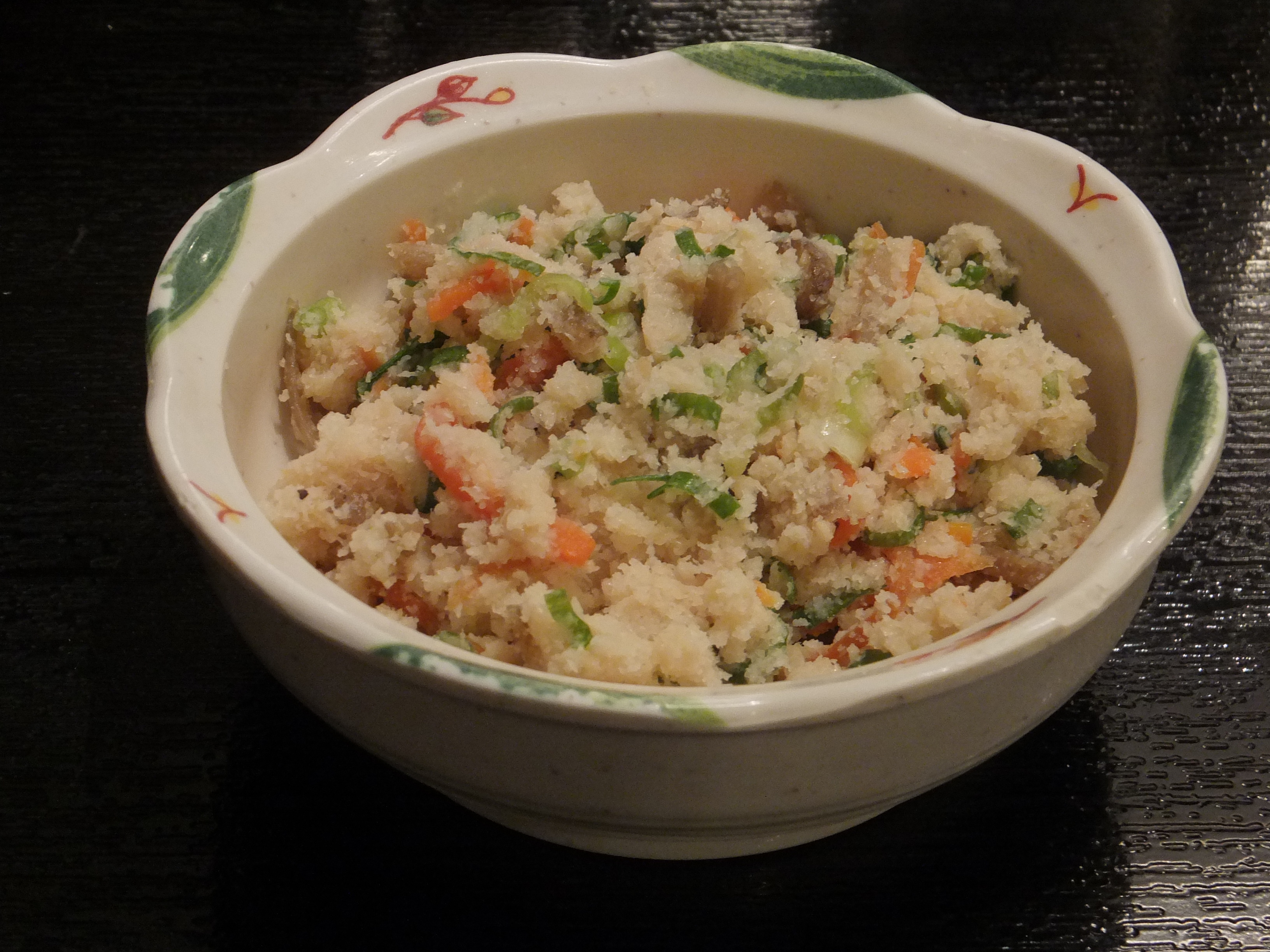 卯の花。ザめしやにて